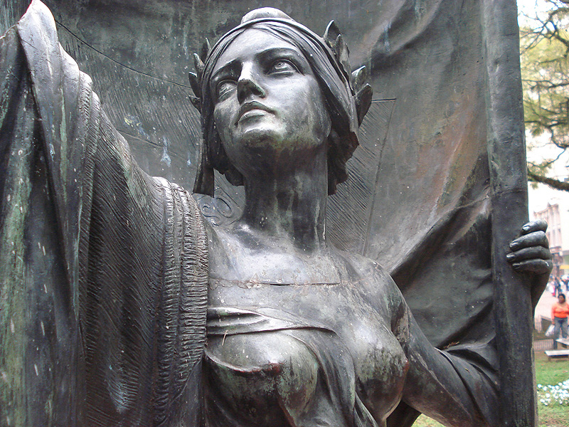 Monumento ao Barão do Rio Branco em Porto Alegre, Brasil. Detalhe da figura da República